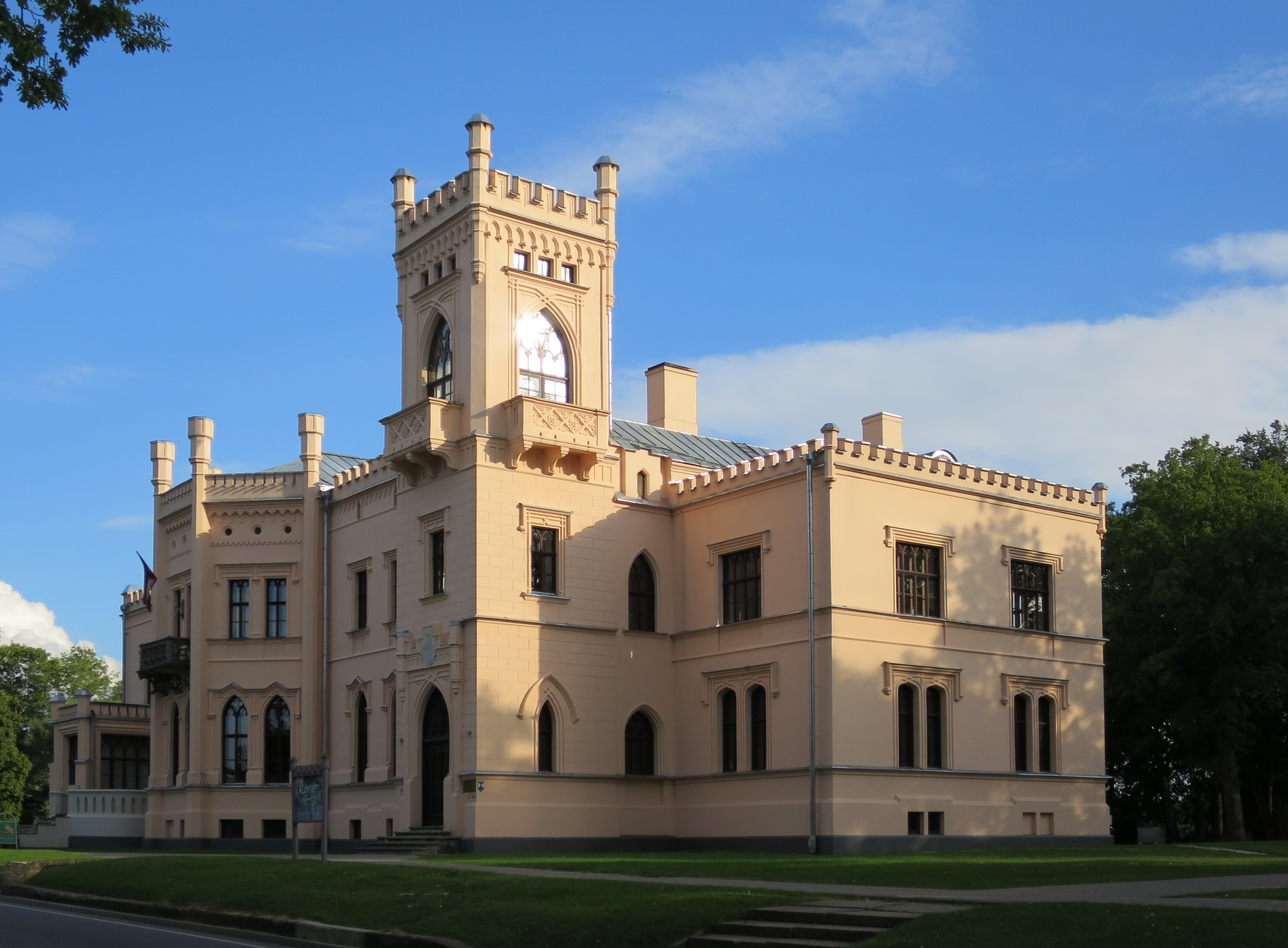 Jaunalūksnes pils, Alūksne, Ozolu iela 1